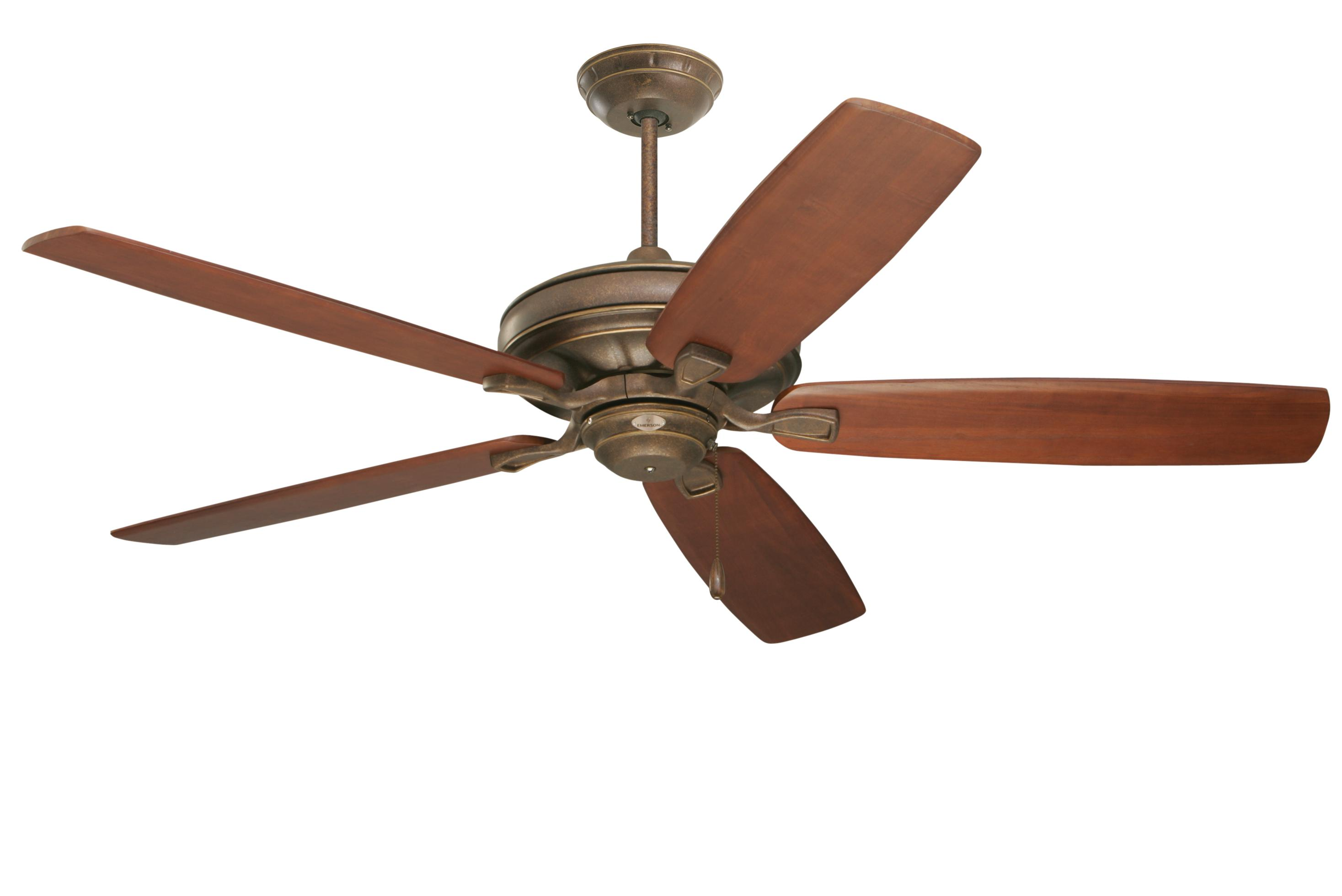 Ventilatore a soffitto in legno con cordicella